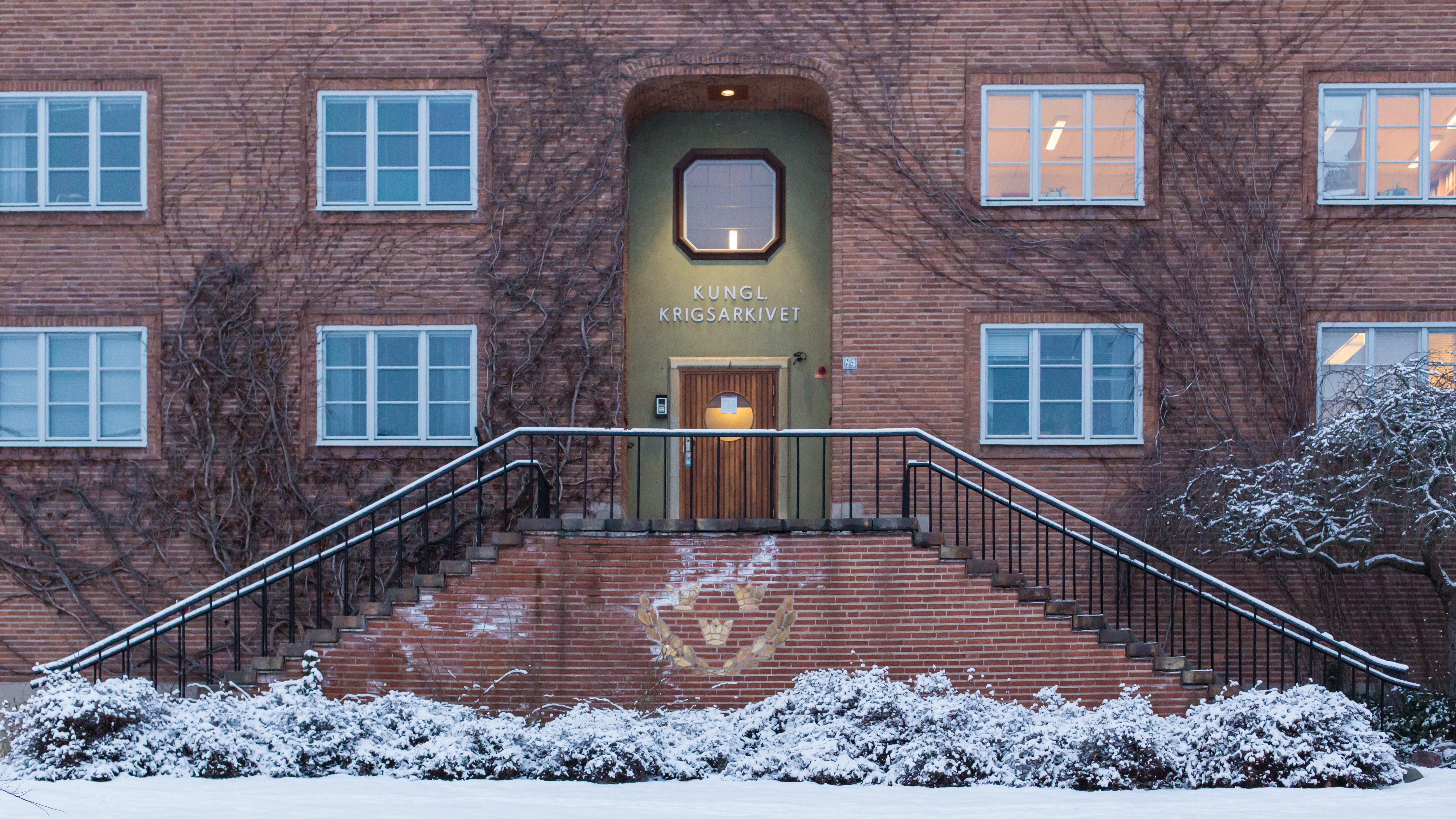 Krigsarkivet, Stockholm, Sverige